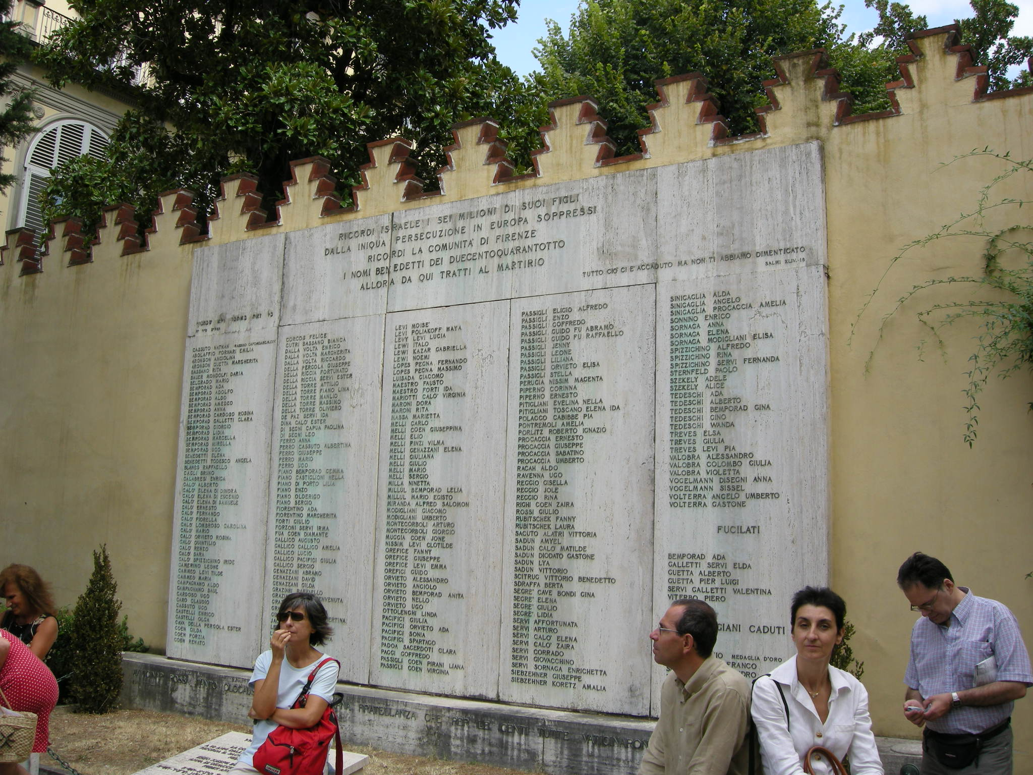 Sinagoga di firenze, lapide